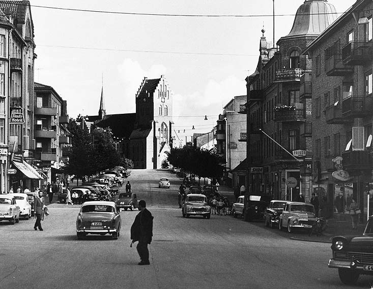 Frejgatan i förgrunden, Hässleholms kyrka i bakgrunden. Bilden troligen från omkring 1960. Motiv: Hässleholm Kategori: Stadsmiljö Frejgatan i förgrunden, Hässleholms kyrka i bakgrunden. Bilden troligen från omkring 1960.